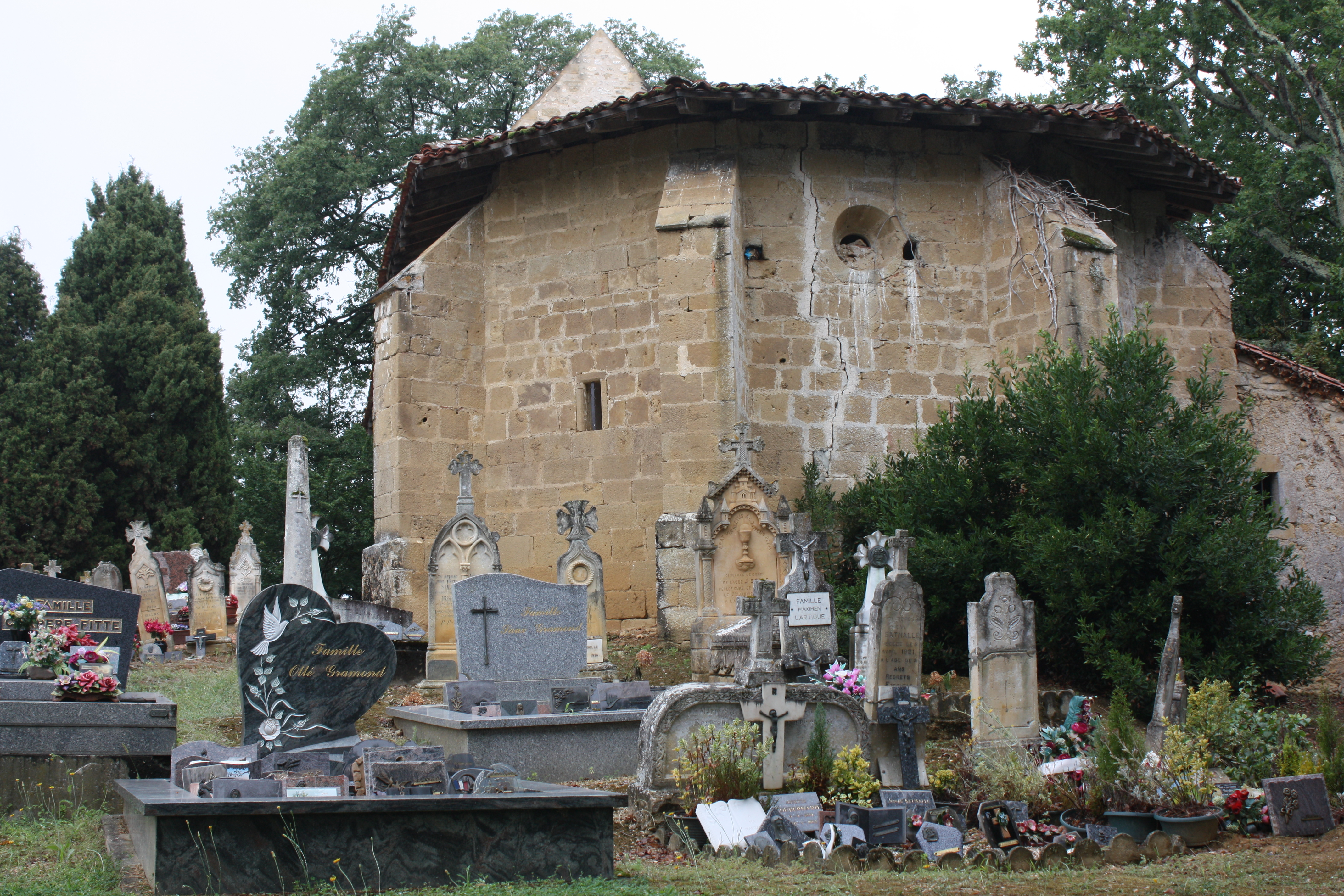 Sarremezan - Chapelle Saint-Julien Abside